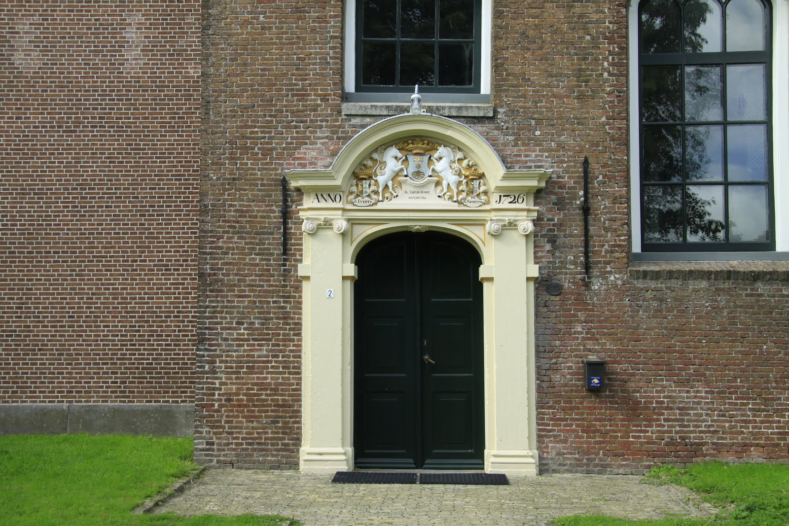 Vincentiuskerk Roordahuizum Reduzum